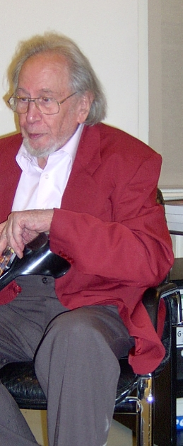 Der Maler Bernhard Heisig während einer Ausstellungseröffnung in Berlin-Mitte, März 2008